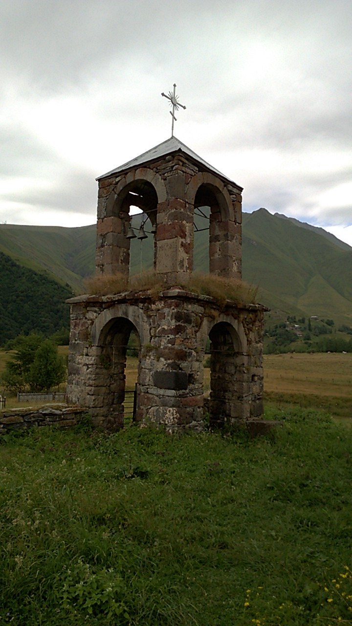 მთავარმოწამის ეკლესიის კომპლექსი